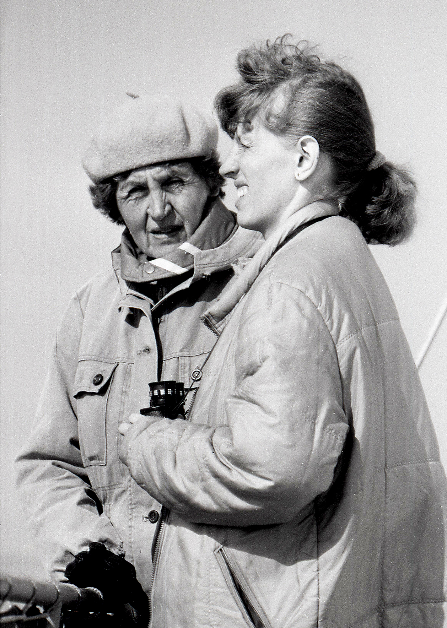 Linda Metsaorg, looduspedagoog ja tütar Kaja Peterson zooloog-ökoloog ja keskkonnateadlane. 1993